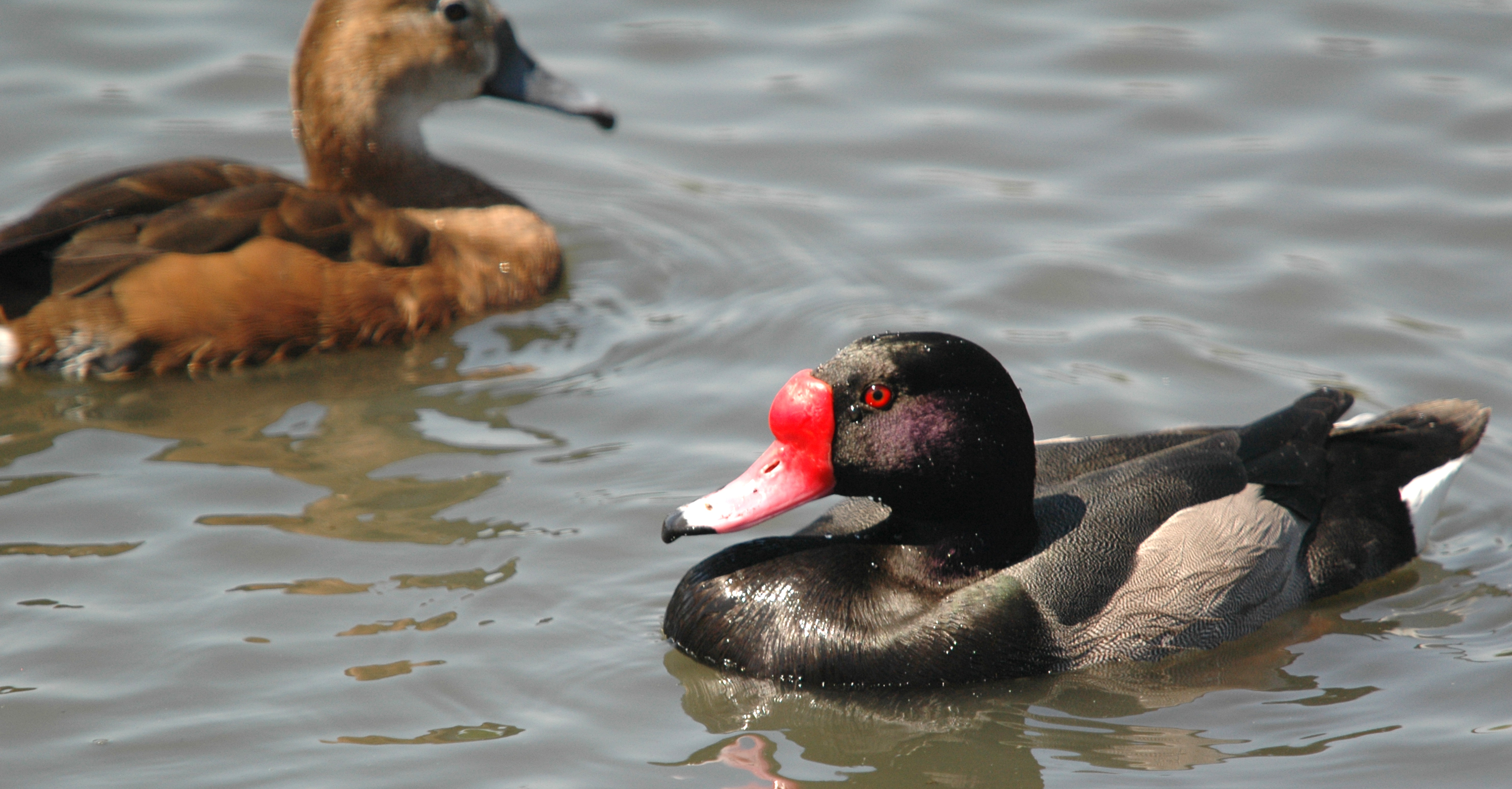 Netta peposaca male & female, Costanera Sur Ecological Reserve, Buenos Aires.